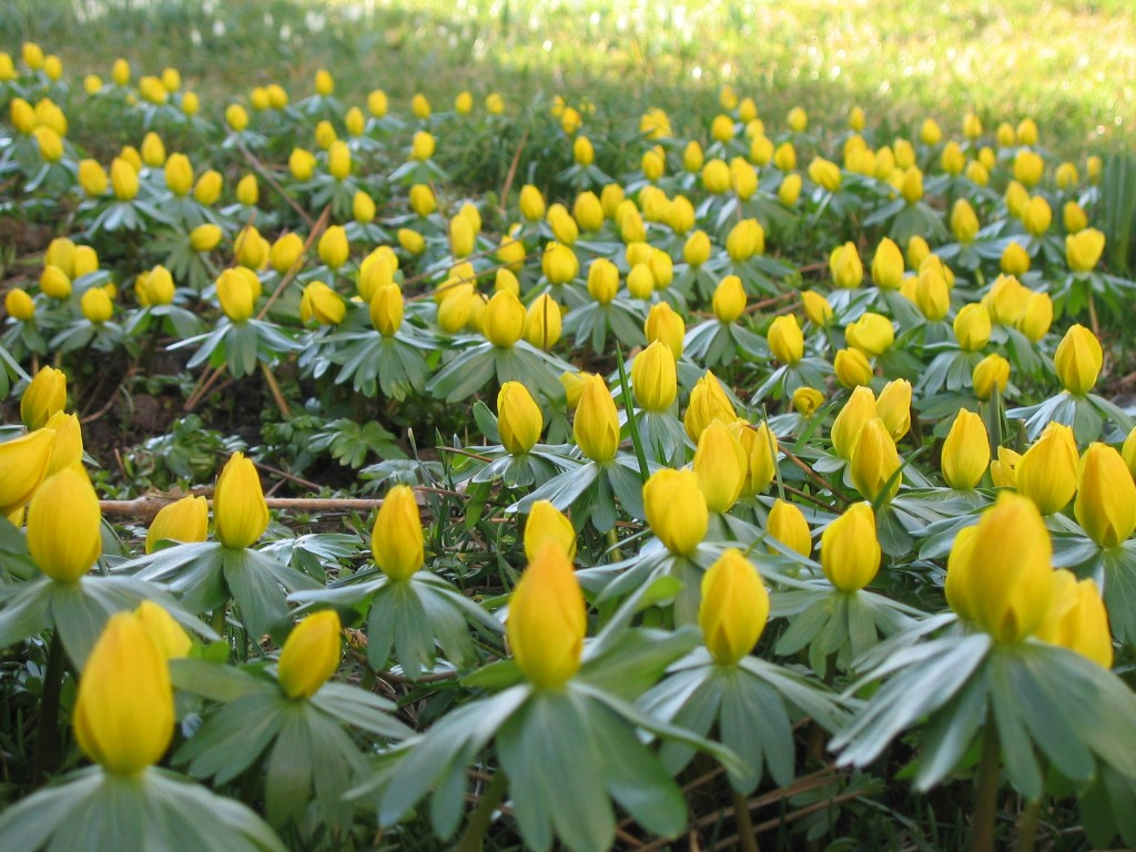 Frühe Winterlinge im eigenen Gerten